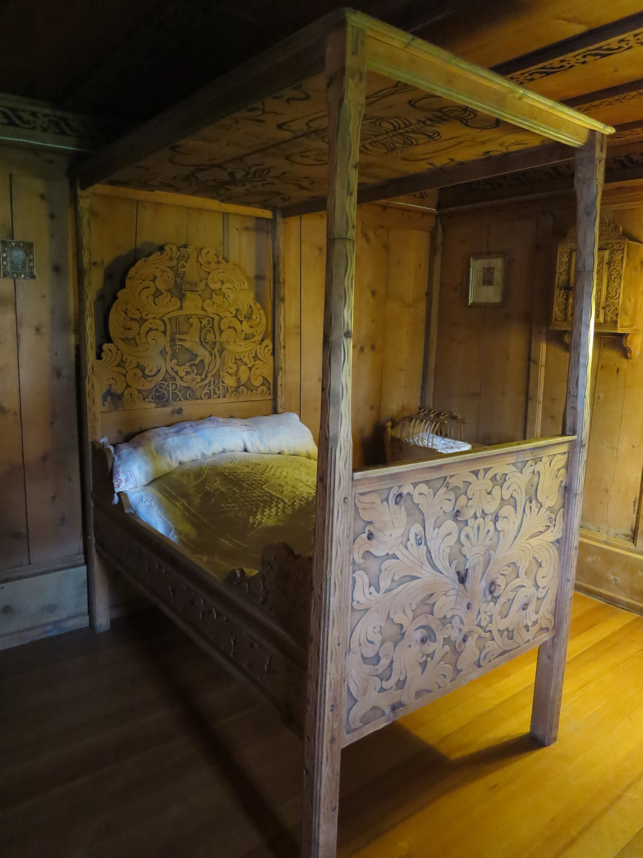 Himmelbett der Pestzeit, Engadiner Musem St. Moritz GR, Schweiz